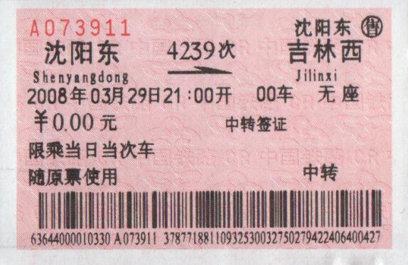 沈阳东-吉林西0元中转签证